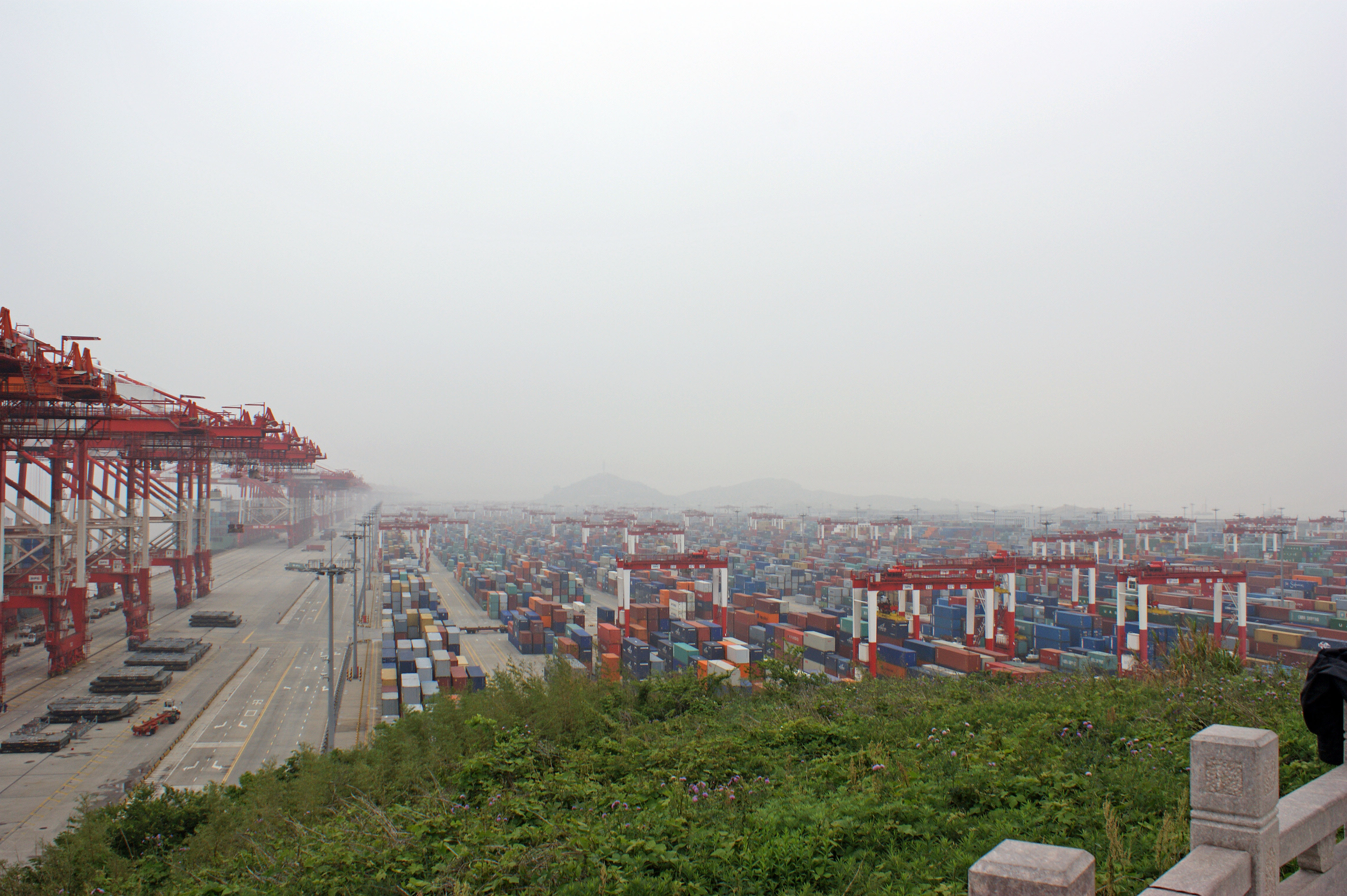 Port containers en eau profonde de Yangshan